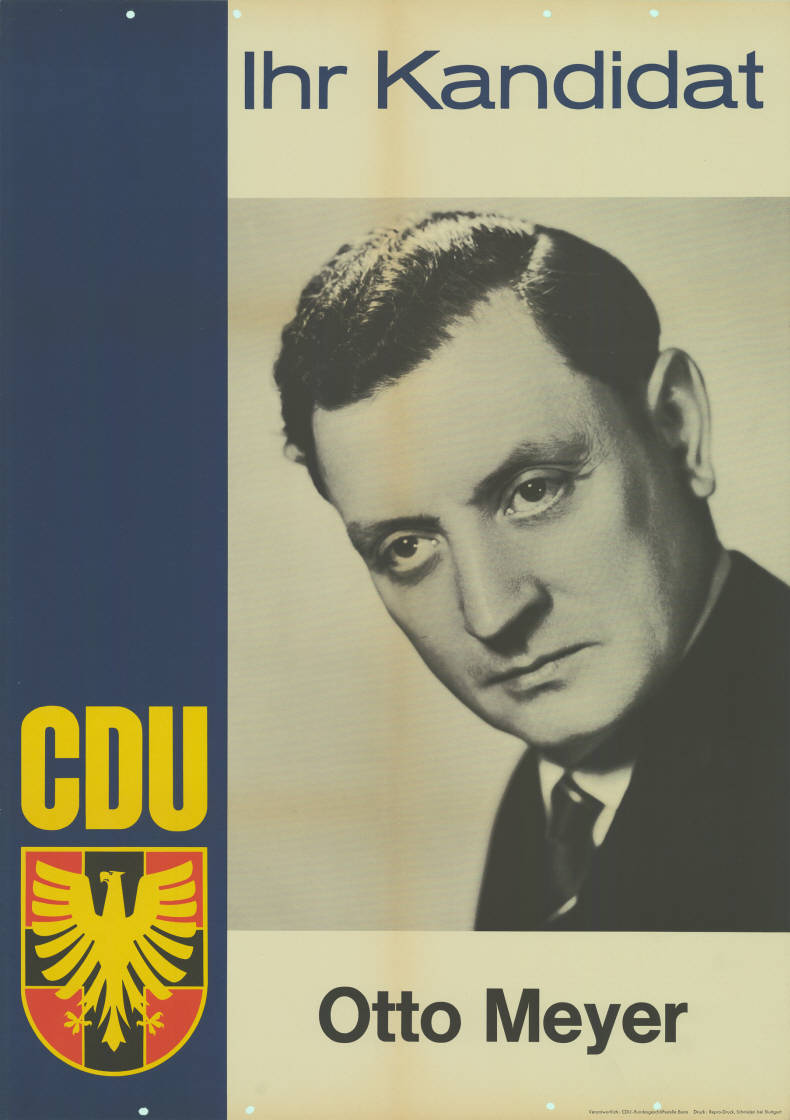 Ihr Kandidat CDU Otto MeyerAbbildung:PorträtfotoPlakatart:Kandidaten-/Personenplakat mit PorträtAuftraggeber:Verantw.: CDU-Bundesgeschäftsstelle BonnDrucker_Druckart_Druckort:Repro-Druck, Schmiden bei StuttgartObjekt-Signatur:10-010 : 224Bestand:Landtagswahlplakate Rheinland-Pfalz (10-010)GliederungBestand10-18:Landtagswahlplakate Rheinland-Pfalz (10-010) » CDULizenz:KAS/ACDP 10-010 : 224 CC-BY-SA 3.0 DE